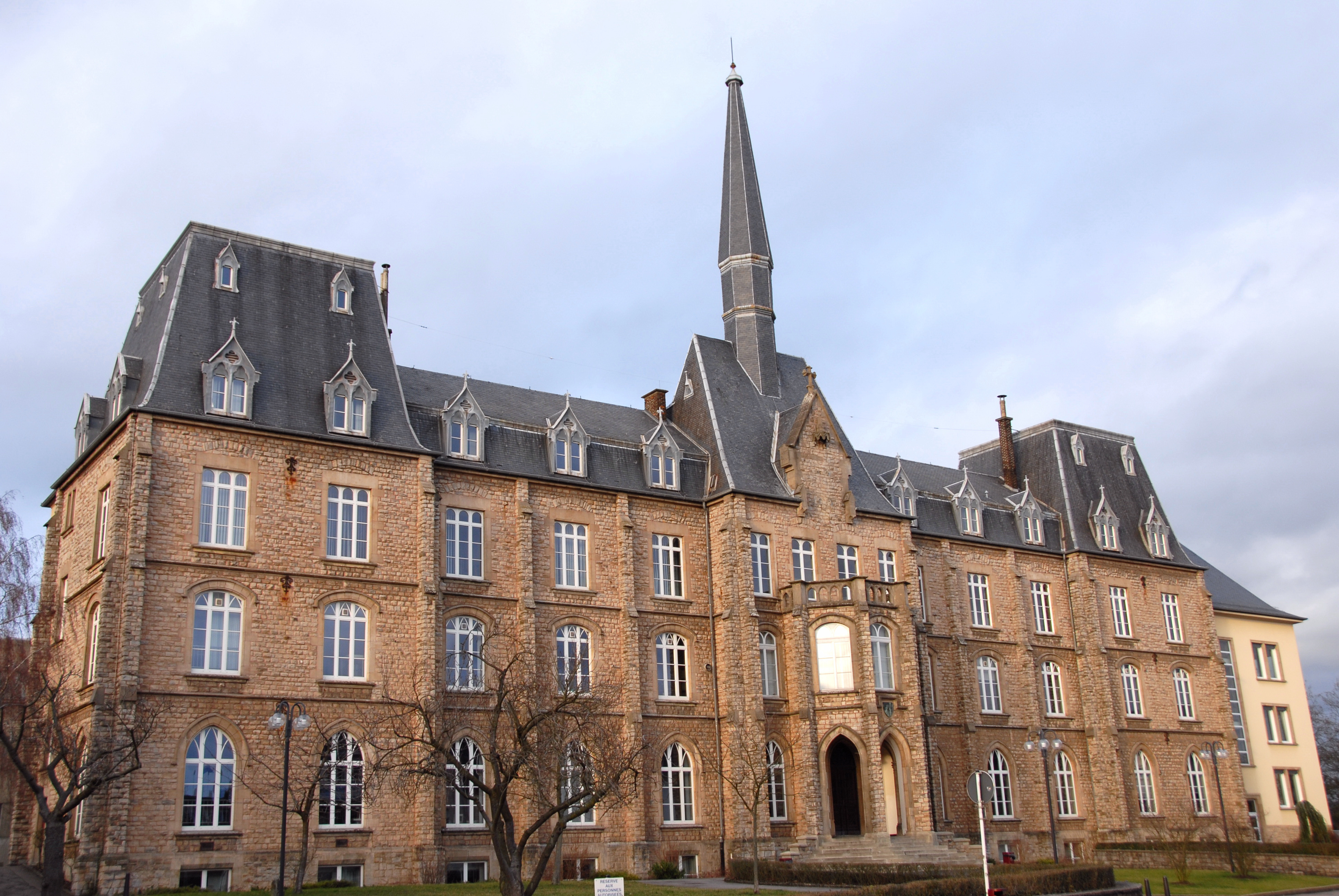 De Lycée technique des Arts et Métiers (Lëtzebuerg-Lampertsbierg).